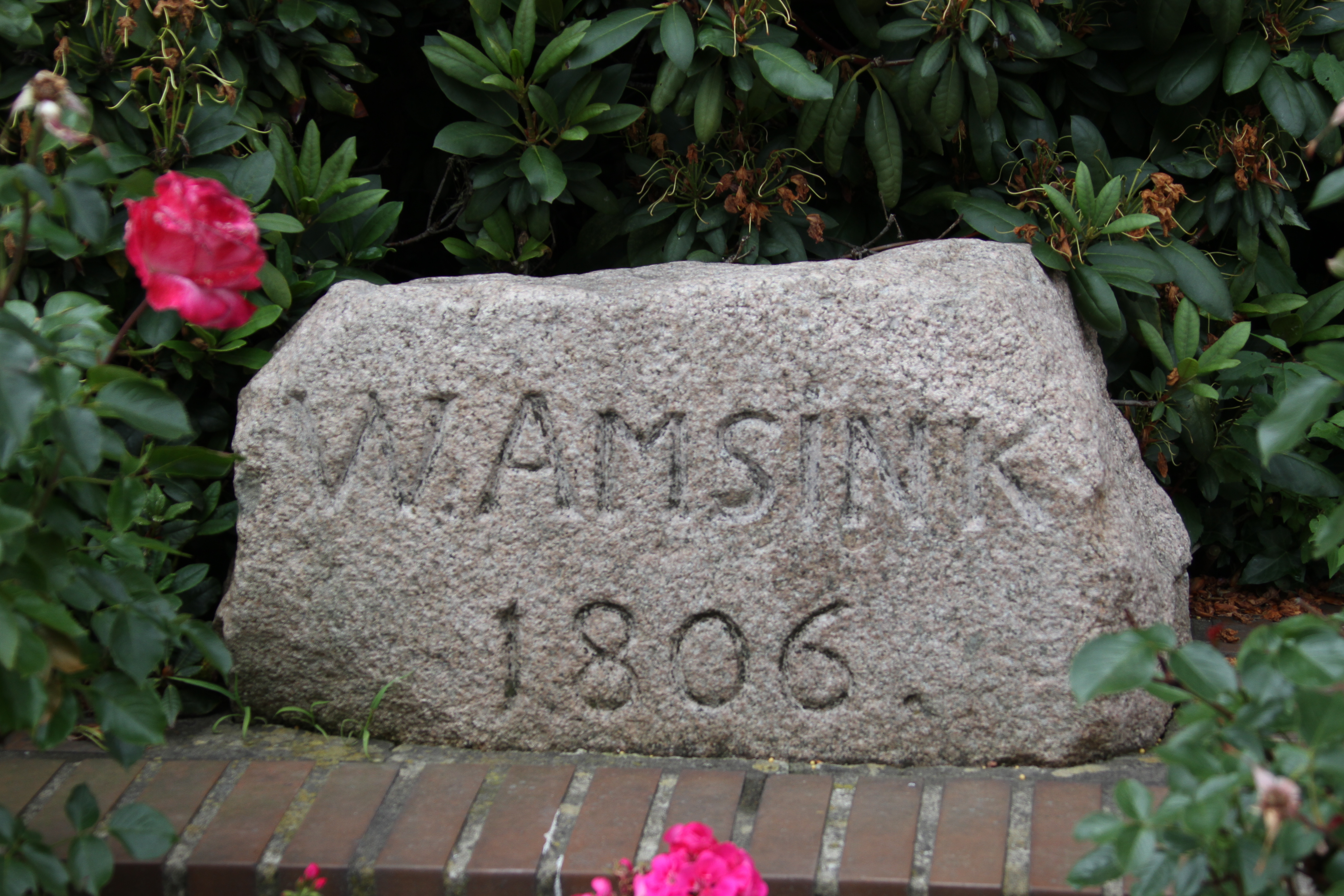 sogenannter Amsinck-Stein, Granitfindling mit der Inschrift W. Amsink/ 1806. This is a photograph of an architectural monument.